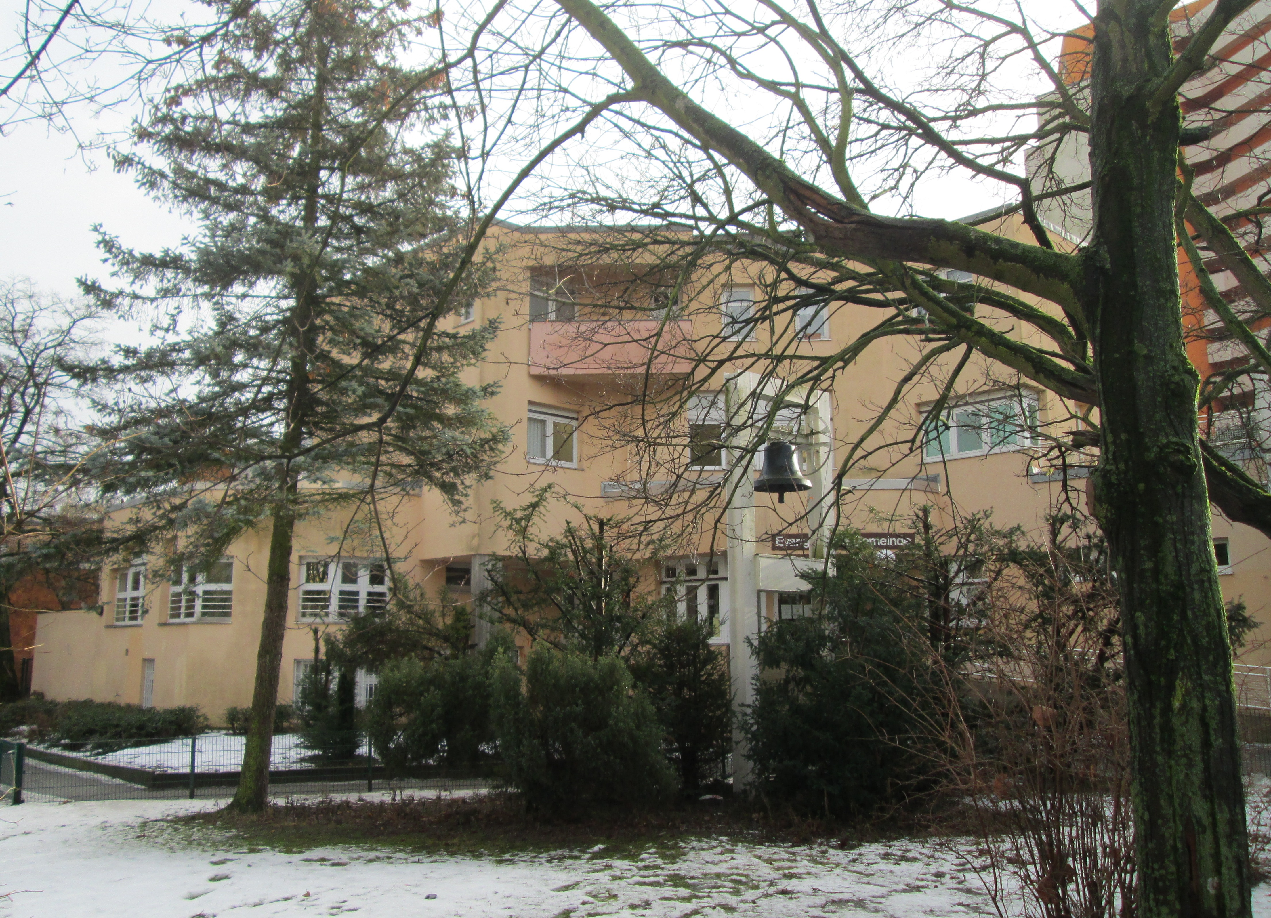 Evangelisches Gemeinwesenzentrum Berlin-Staaken, Blick von Norden